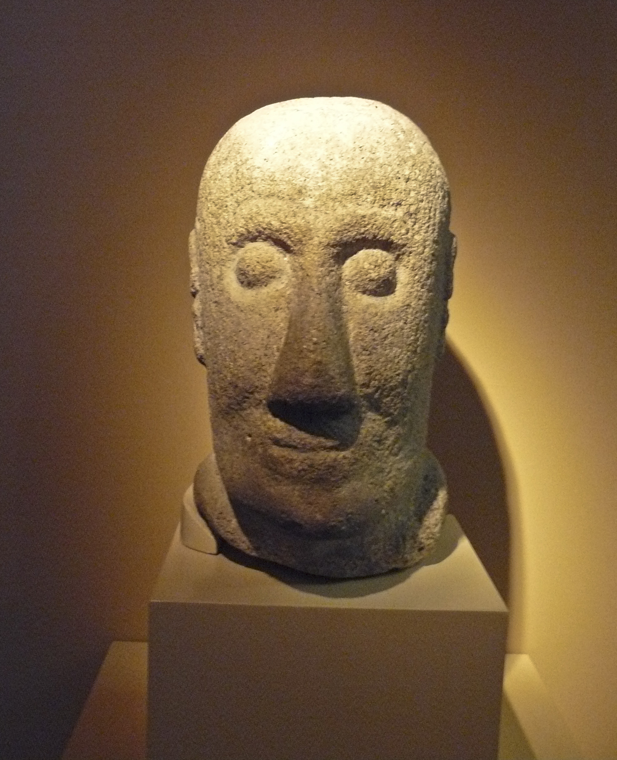 Cabeza de guerreiro castrexo de Rubiás no concello de Bande